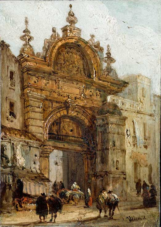 Puerta del Arenal de Sevilla por Genaro Pérez Villaamil.